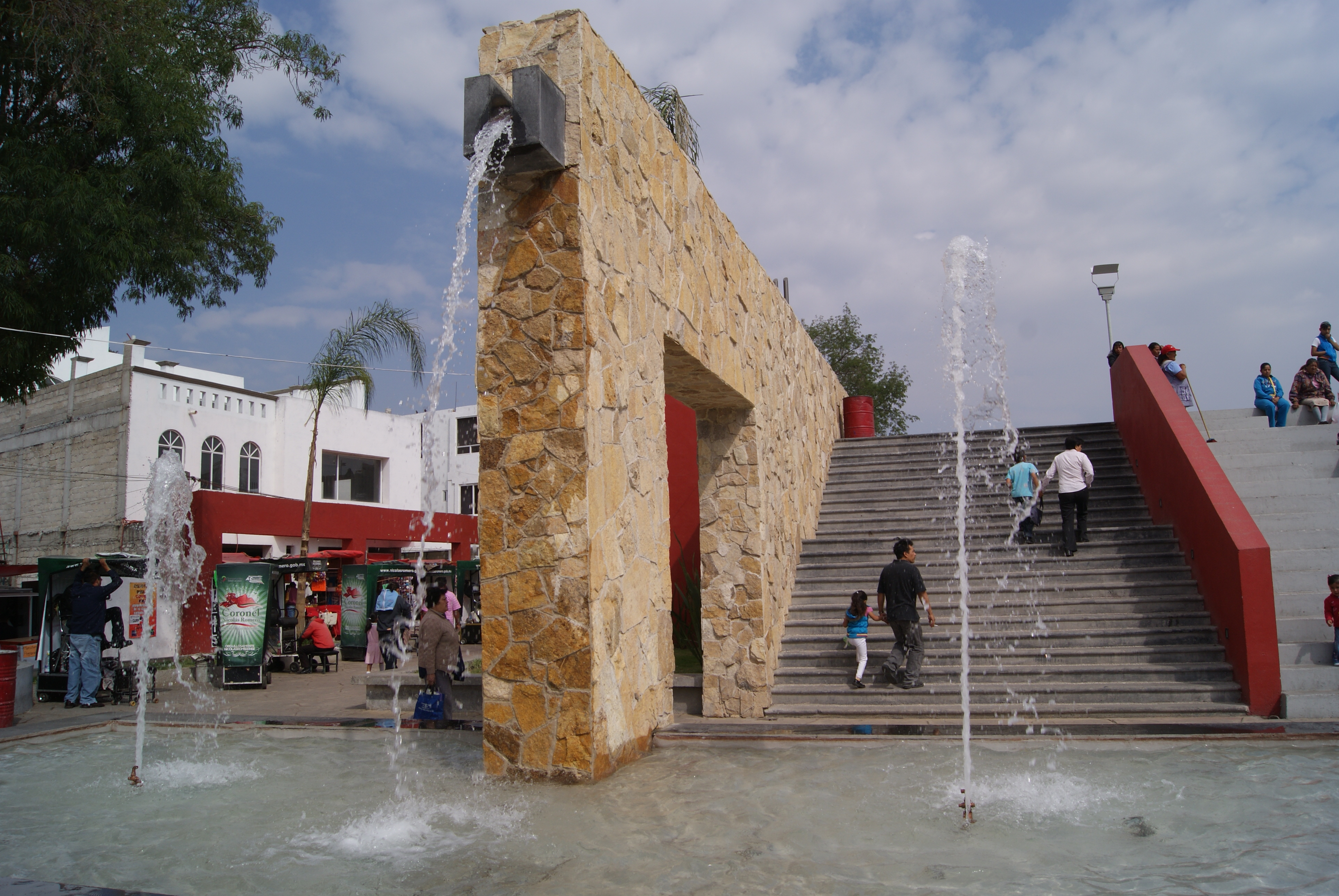 Punto de encuentro de los Nicolasromerenses dando identidad a l municipio